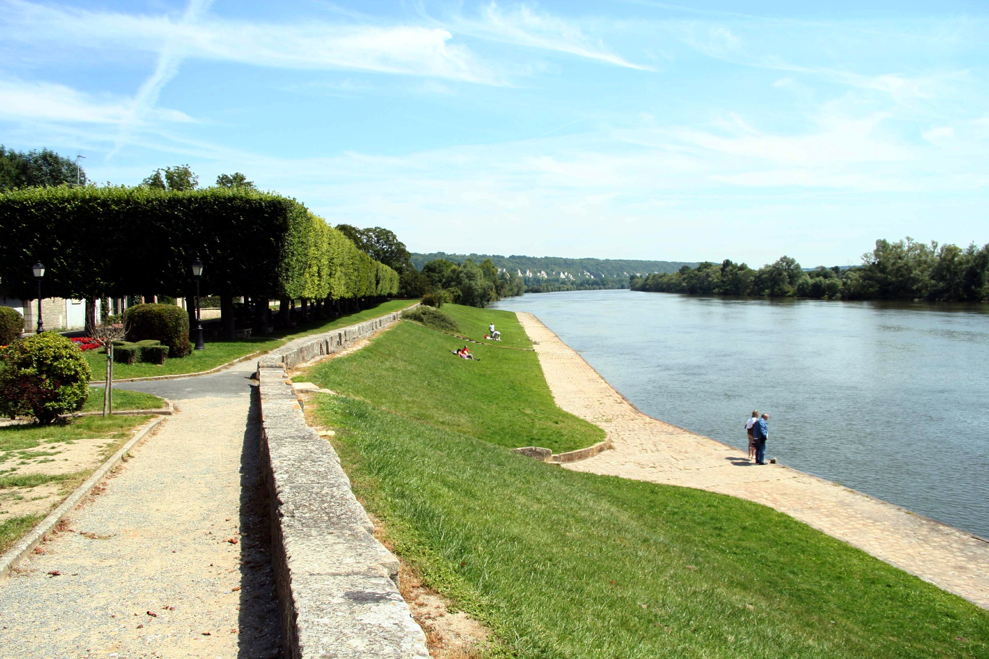 Bord de Seine, la Roche-Guyon, Val-d'Oise (France)